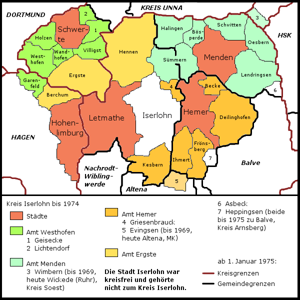 Karte des Kreises Iserlohn 1974/1975